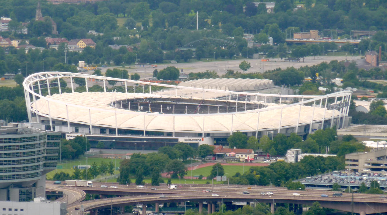 Blick vom Rotenberg auf die Mercedes-Benz-Arena